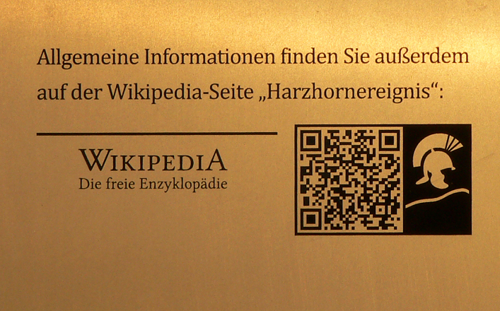 Harzhorn mit QR Code an Infostele mit Hinweis auf Wikipedia